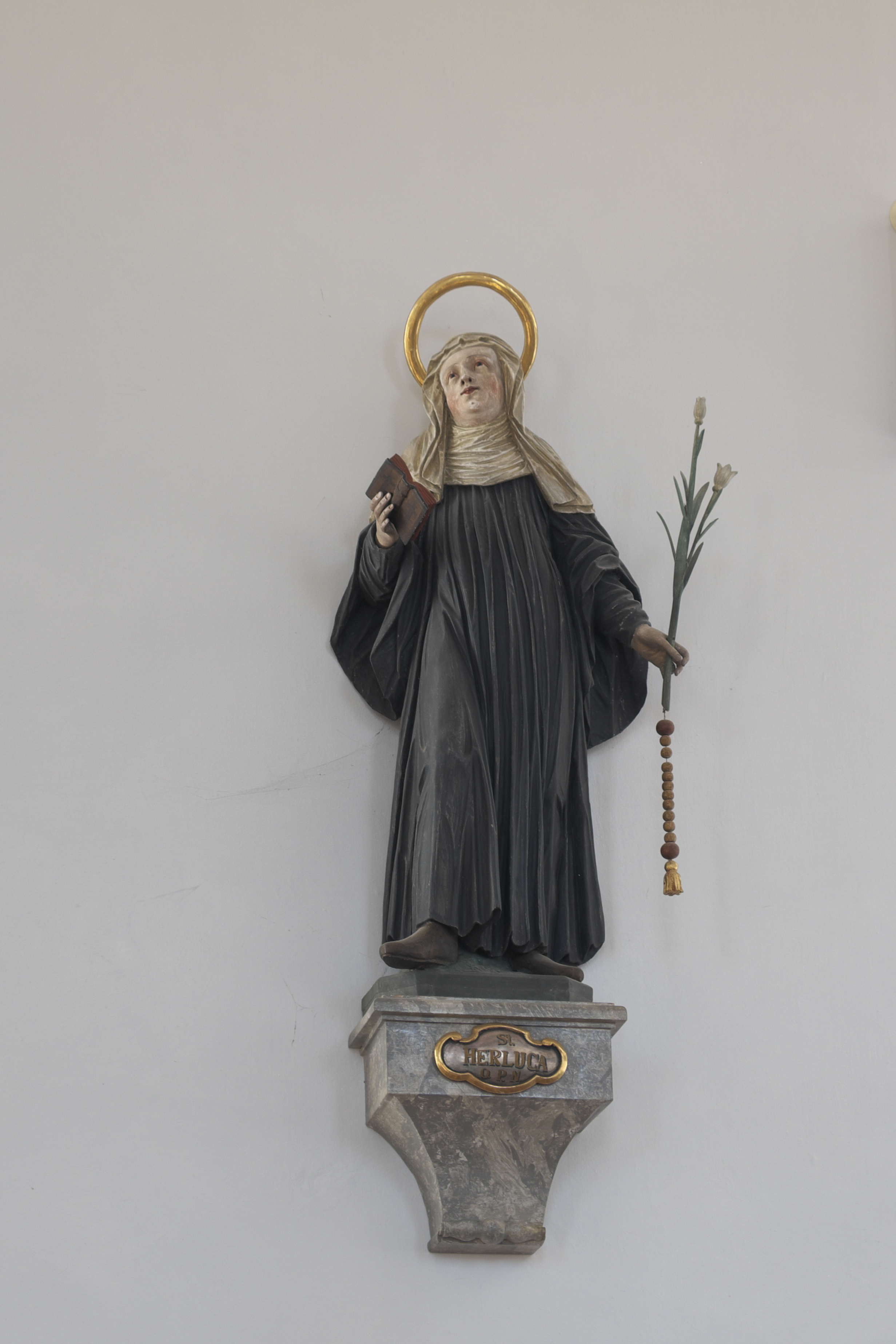 Katholische Pfarrkirche St. Bartholomäus in Epfach (Denklingen) im Landkreis Landsberg am Lech (Bayern/Deutschland), selige Herluka von Bernried